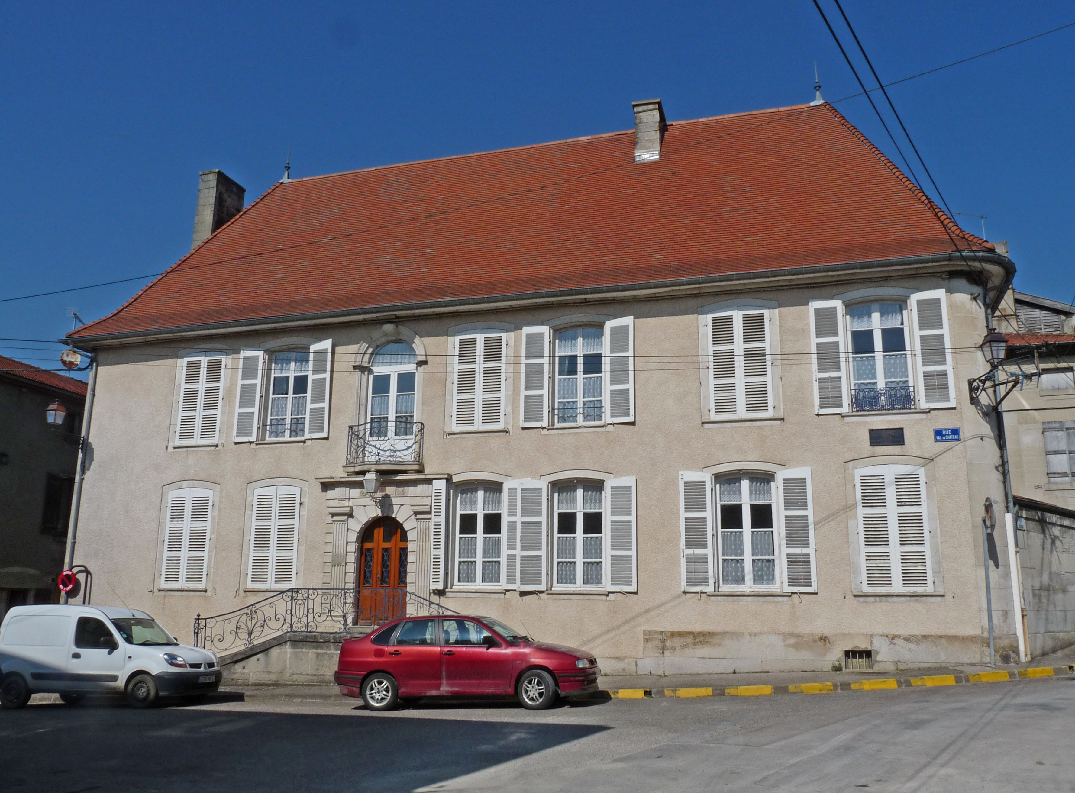 Maison Claudel à Wassy (Haute-Marne), au 11, rue du Val-du-Château. Maison du XVIIe siècle habitée de 1879 à 1881 par Paul et Camille Claudel